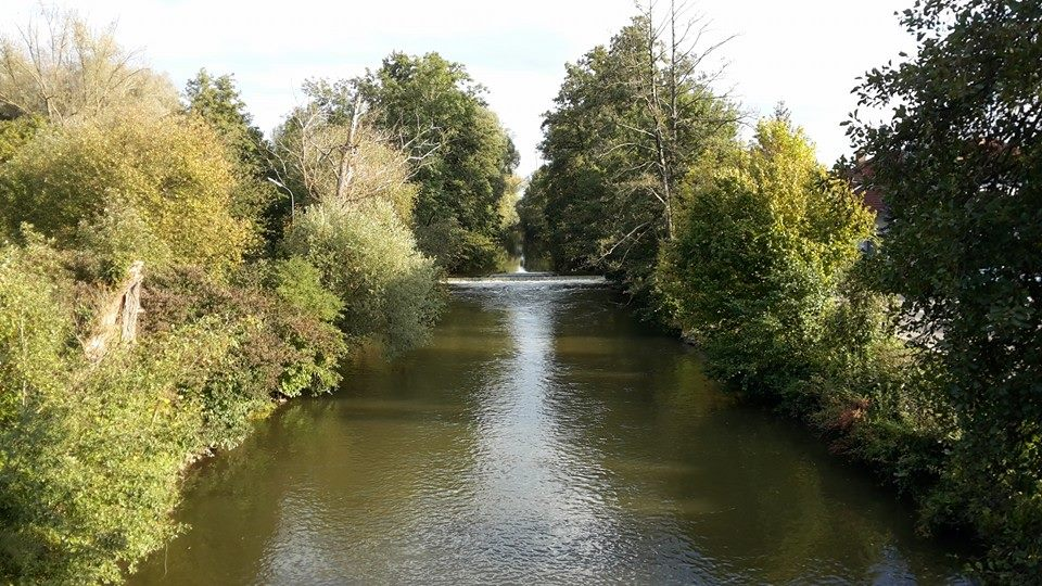 Rzeka Paar w miejscowosci Baar-Ebenhausen